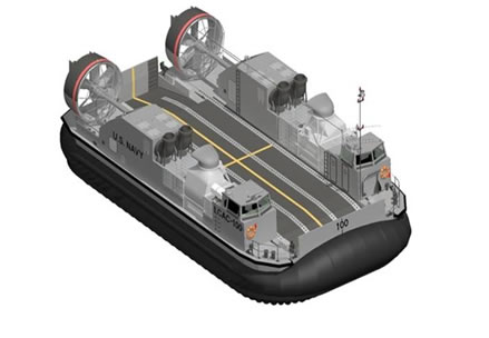 Dessin d'un aéroglisseur Ship-to-Shore Connector de l'US Navy.